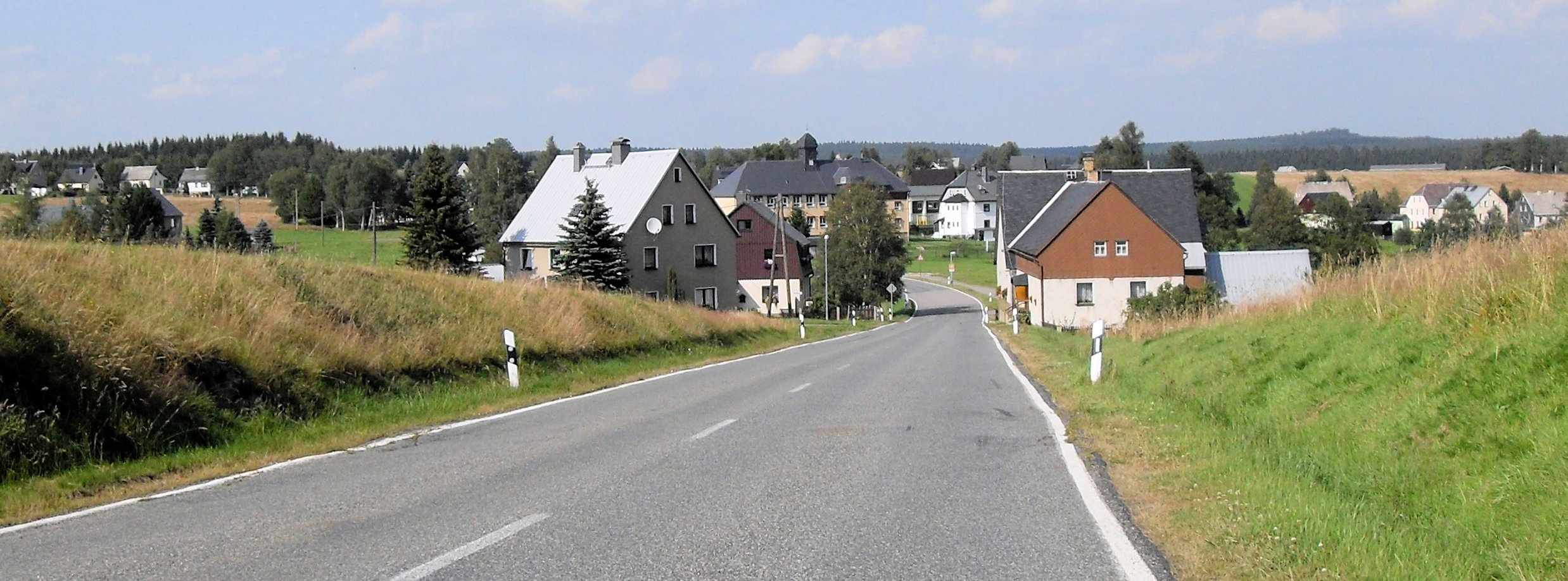 Marienberger Ortsteil Kühnhaide, südlicher Ortseingang, Erzgebirge, Deutschland